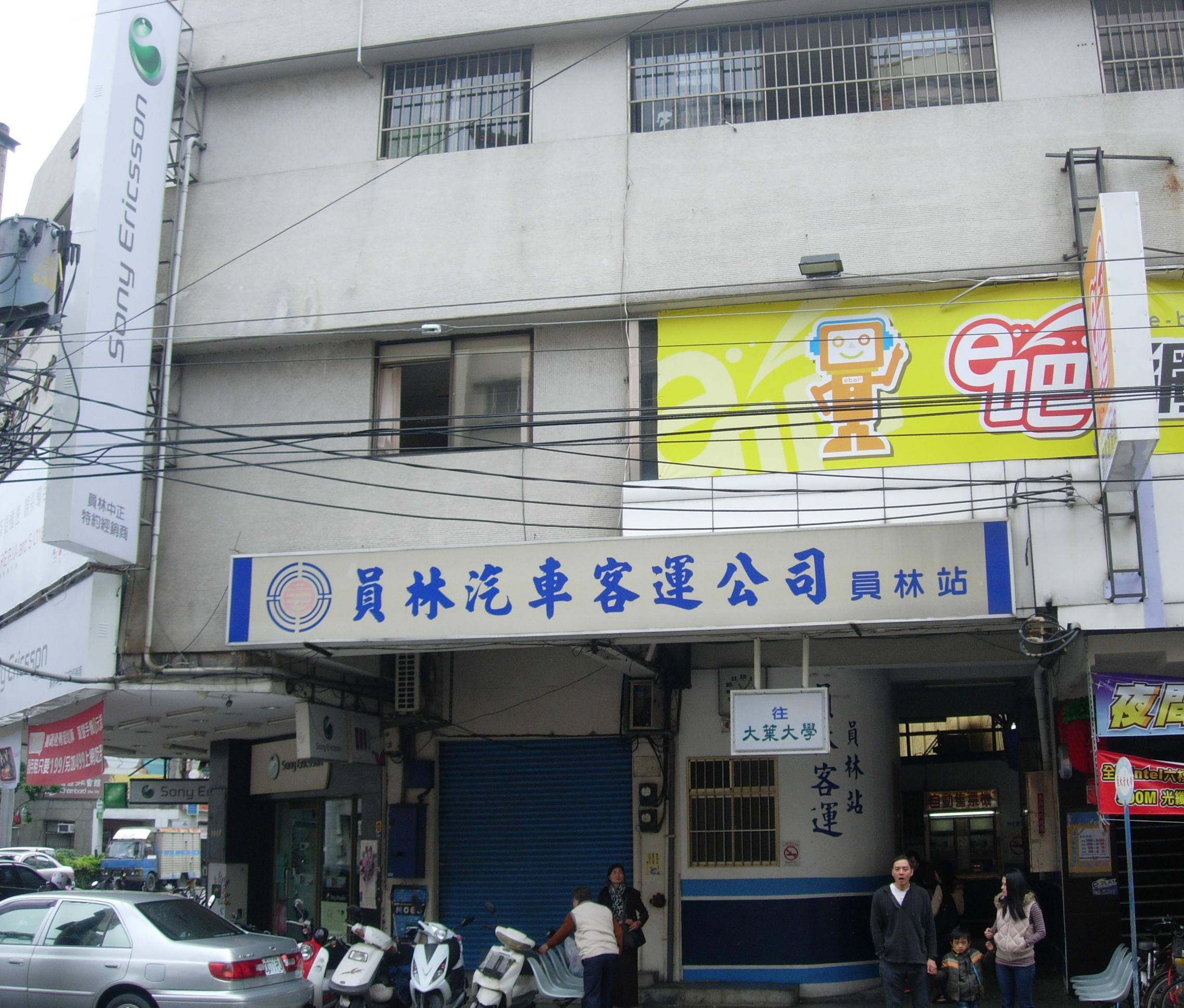 中文（台灣）: 員林客運員林站入口